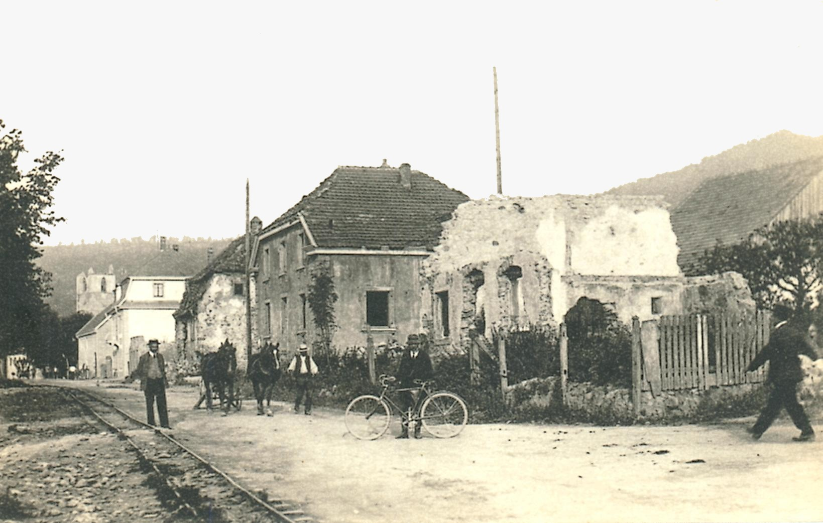 Wattwiller 1920 : Ruines, évacuation des gravats et reconstruction